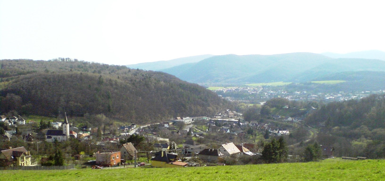 Pohľad na Obišovce z hrebeňa, v pozadí je Kysak